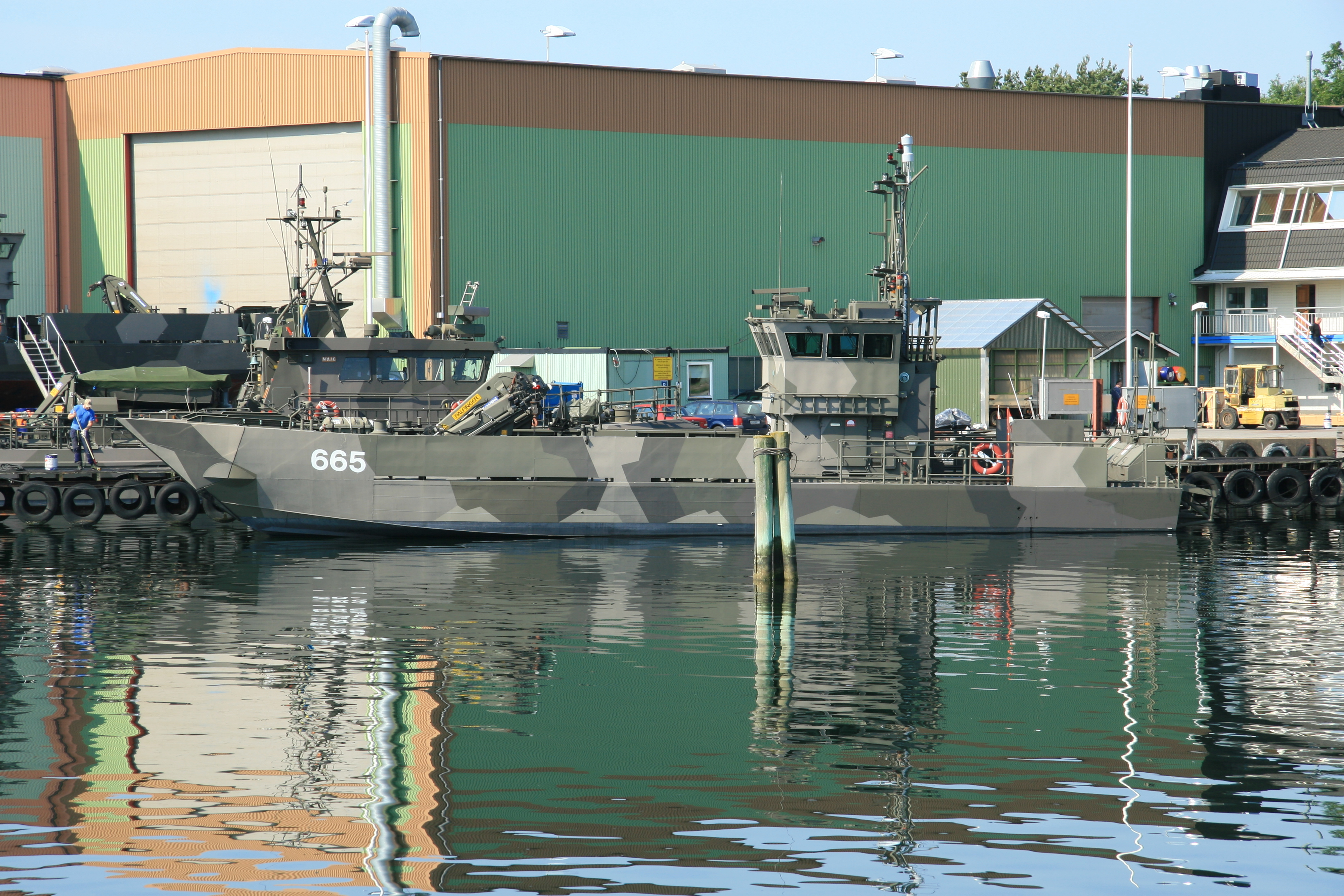 Djupviks Varv (Swede Ship Marine AB), Fagerfjäll, Tjörn 6 juli 2006. Trossbåt 665